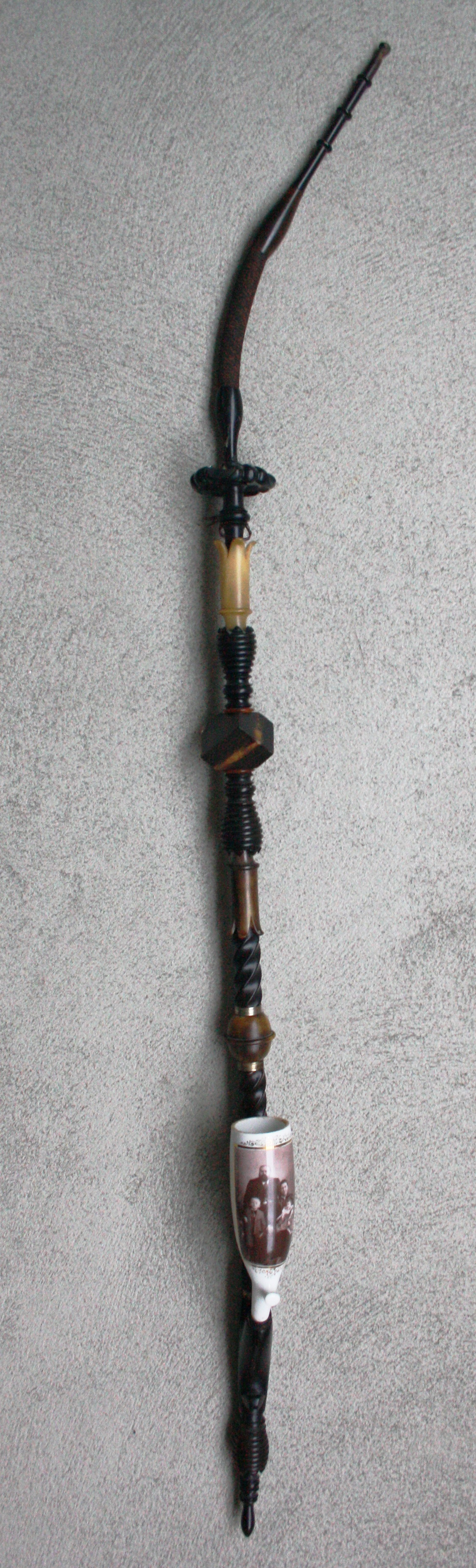 Tabakpfeife aus München. Porzellankopf mit Familienfoto. Hergestellt vor 1900.